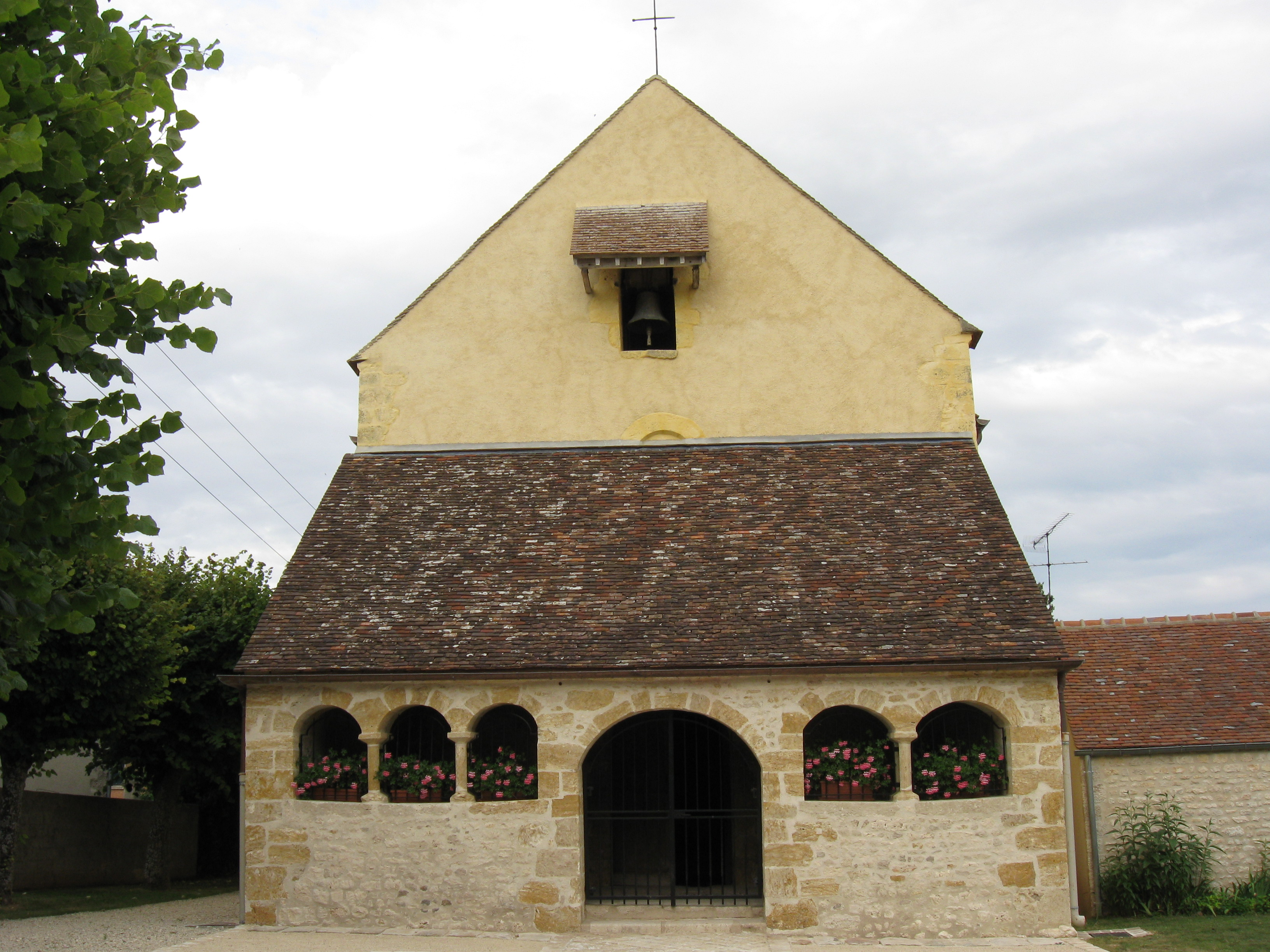 Église Saint-Sulpice-et-St-Antoine (Chenou, département de la Seine-et-Marne, région Île-de-France)